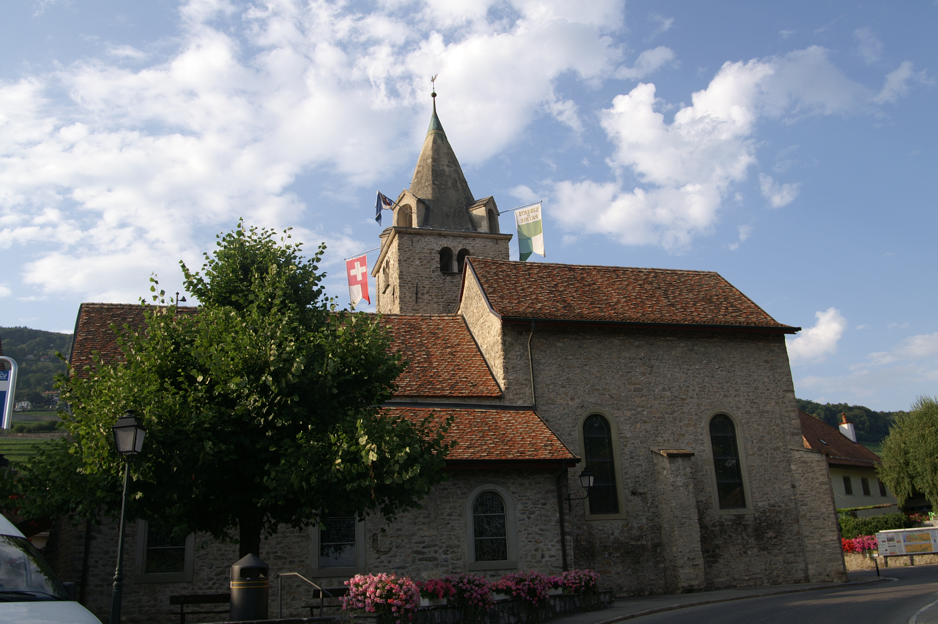 Église réformée de Saint-Maurice, Temple de Corsier-sur-Vevey.